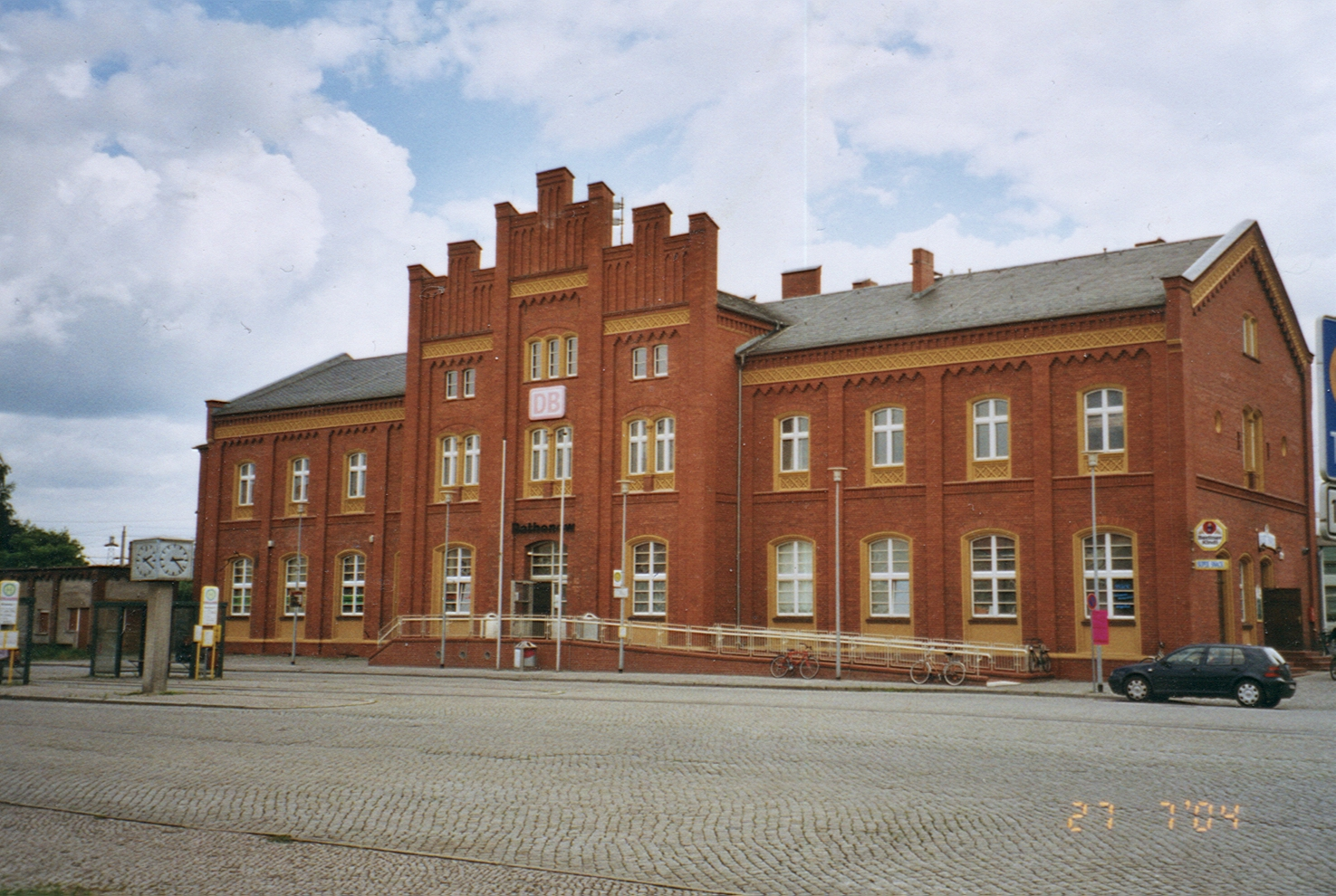 Bahnhof Rathenow am 2004-07-27. Landkreis Havelland, Brandenburg, Deutschland.